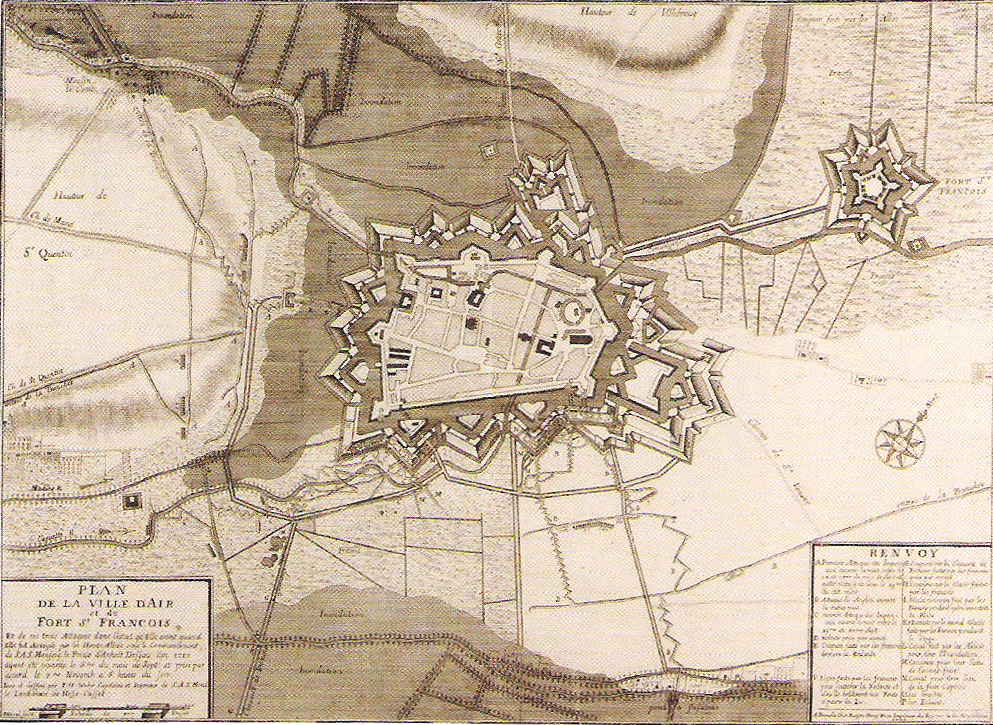 Plan de la ville d'Aire en 1711.